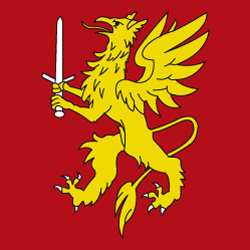 wappen von leuk-stadt